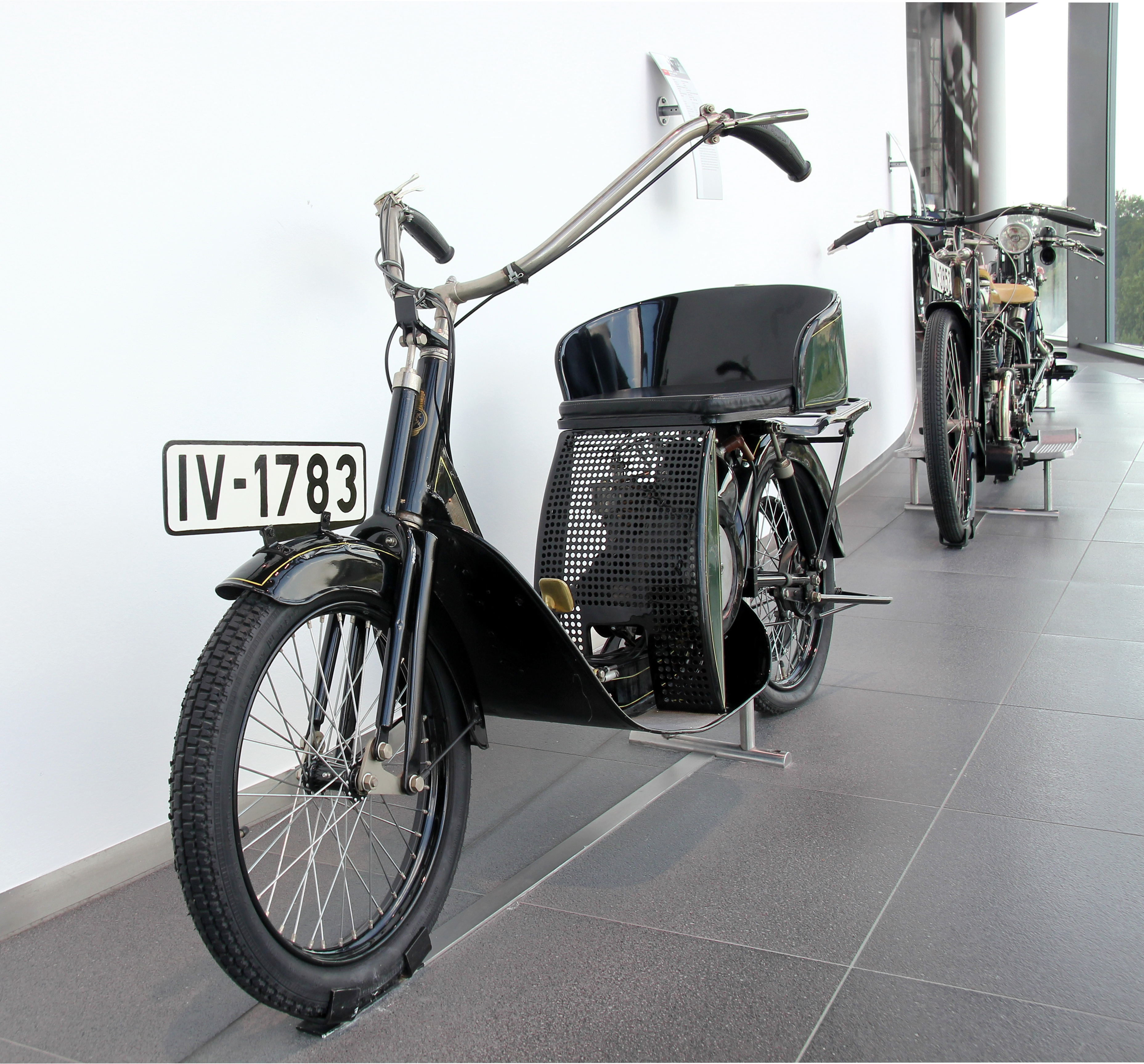 Sesselmotorrad DKW Lomos, Baujahr 1923, mit Vorder- und Hinterradschwinge im museum mobile in Ingolstadt